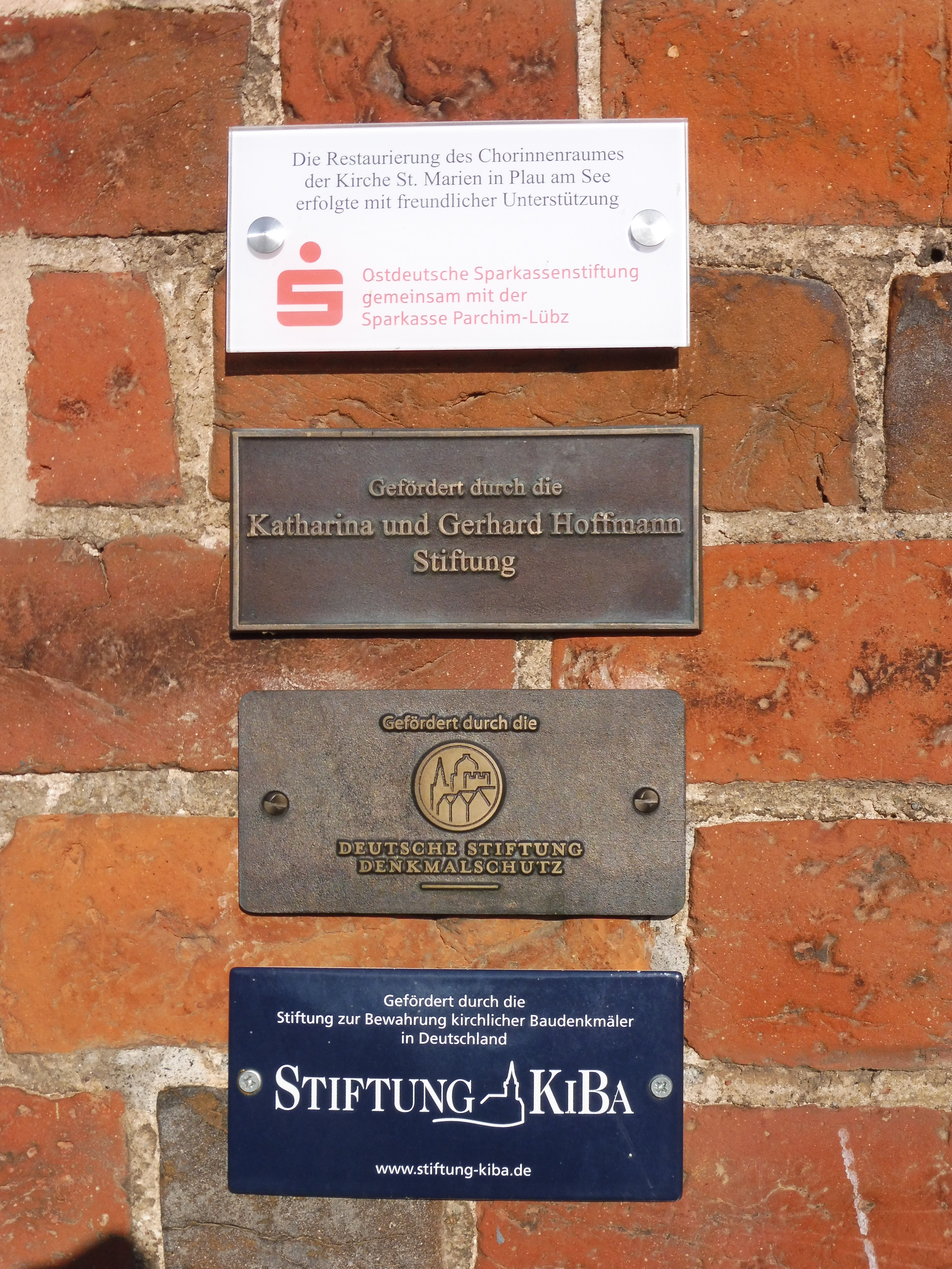 Finanzielle Förderer der Restaurierung von St. Marien in Plau am See